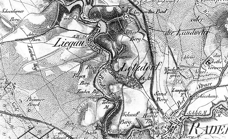 Original image description from the Deutsche Fotothek Radeberg-Liegau-Augustusbad und Lotzdorf. Ausschnitt aus: Oberreit, Sect. Dresden, 1821/22